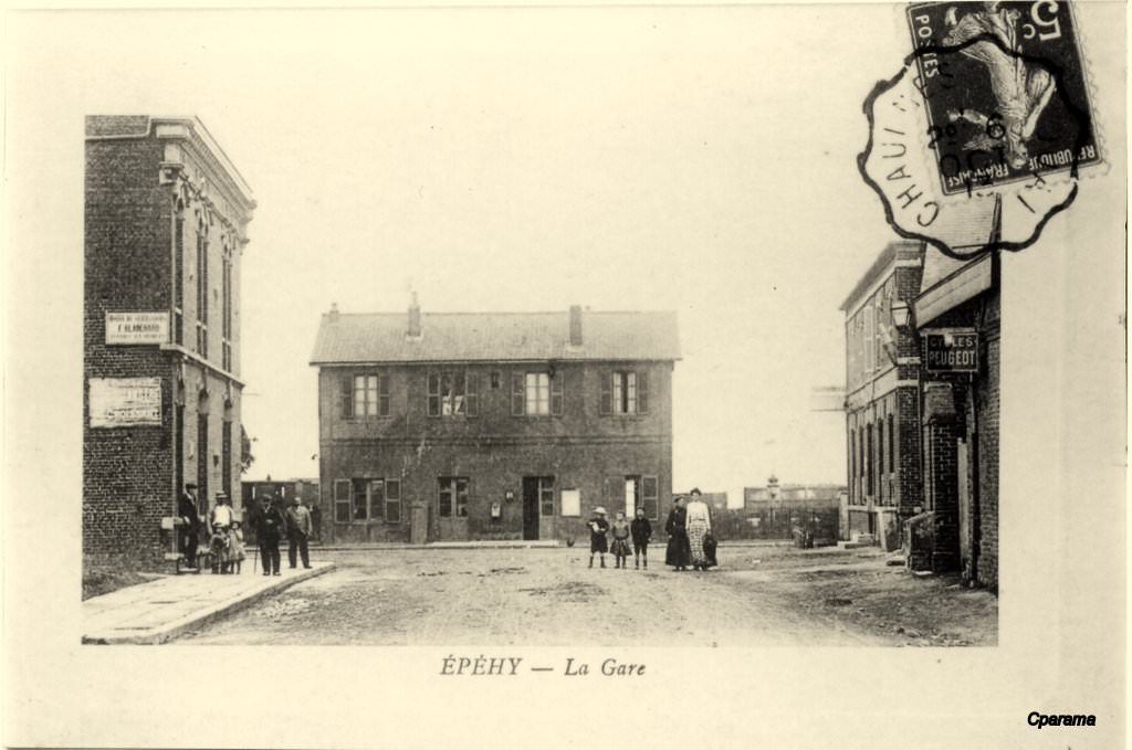 La gare d'Epehy avant 1914.